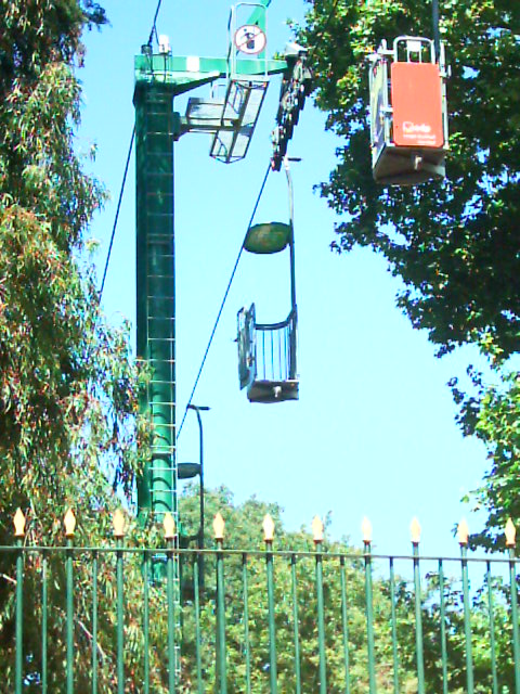 Telecesta do Zoo de Lisboa